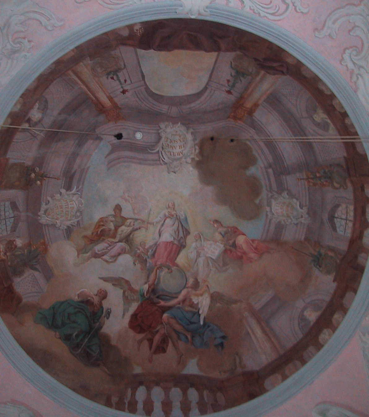 Aufnahme 16. Mai 2005, Schlosskapelle Mammern, Gemälde der Vierungskuppel von Franz Ludwig Hermann (1750): Maria als unbefleckte Empfängis vom Berge Karmel mit Ekklesia und Tugendallegorien.